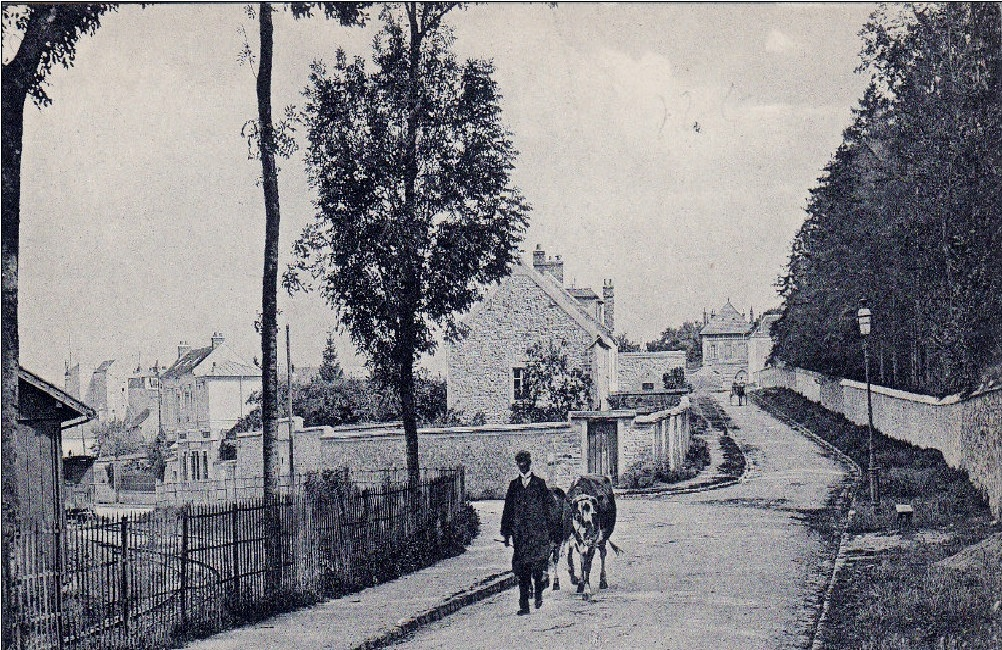 La route Baron-frélaut à Melun au début du XXème siècle.